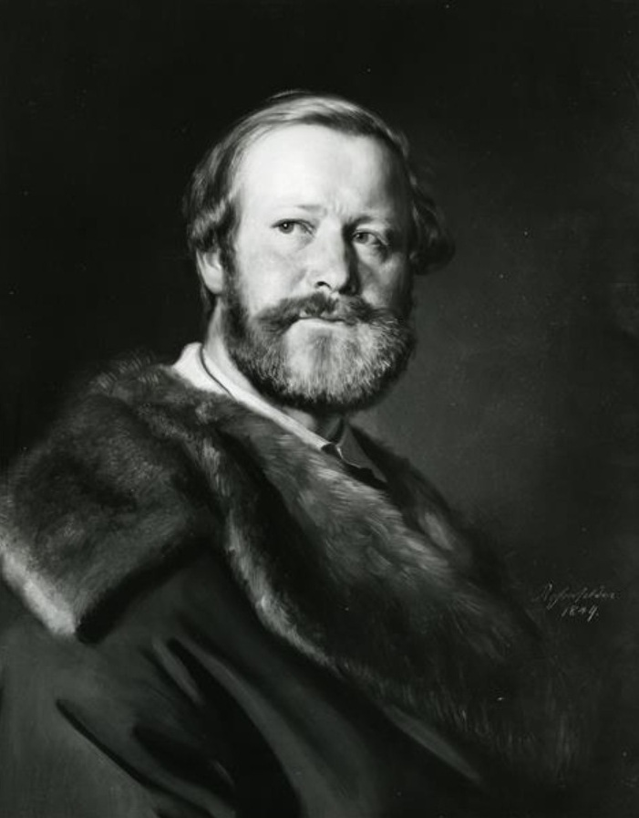 Bildnis des Malers Ernst Resch (1807–1864)